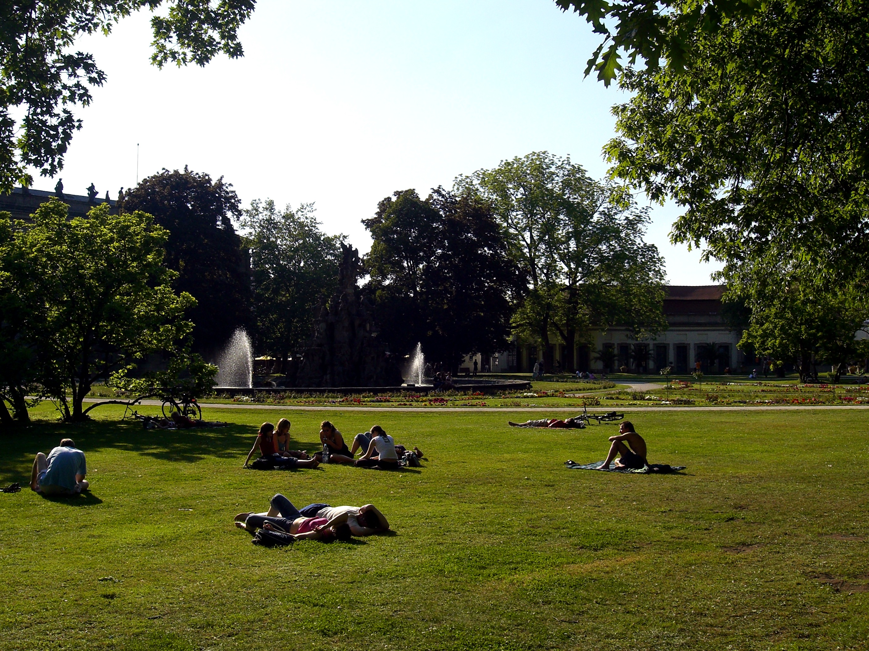 Der Erlanger "Schlossgarten" Zentrum einer Reihe universitärer Einrichtungen und Vorlesungsgebäude der de: Friedrich-Alexander-Universität Erlangen-Nürnberg in Erlangen, Germany, wird im Sommer viel von Studenten genutzt. Im Zentrum erkennbar der Hugenottenbrunnen, rechts im Hintergrund die Orangerie, die das Institut für Kirchenmusik sowie das Institut für Kunstgeschichte beherbergt. The park "Schlossgarten" (german), the centre of the en: Friedrich-Alexander-University, Erlangen-Nuremberg in Erlangen, Germany, crowded by students.